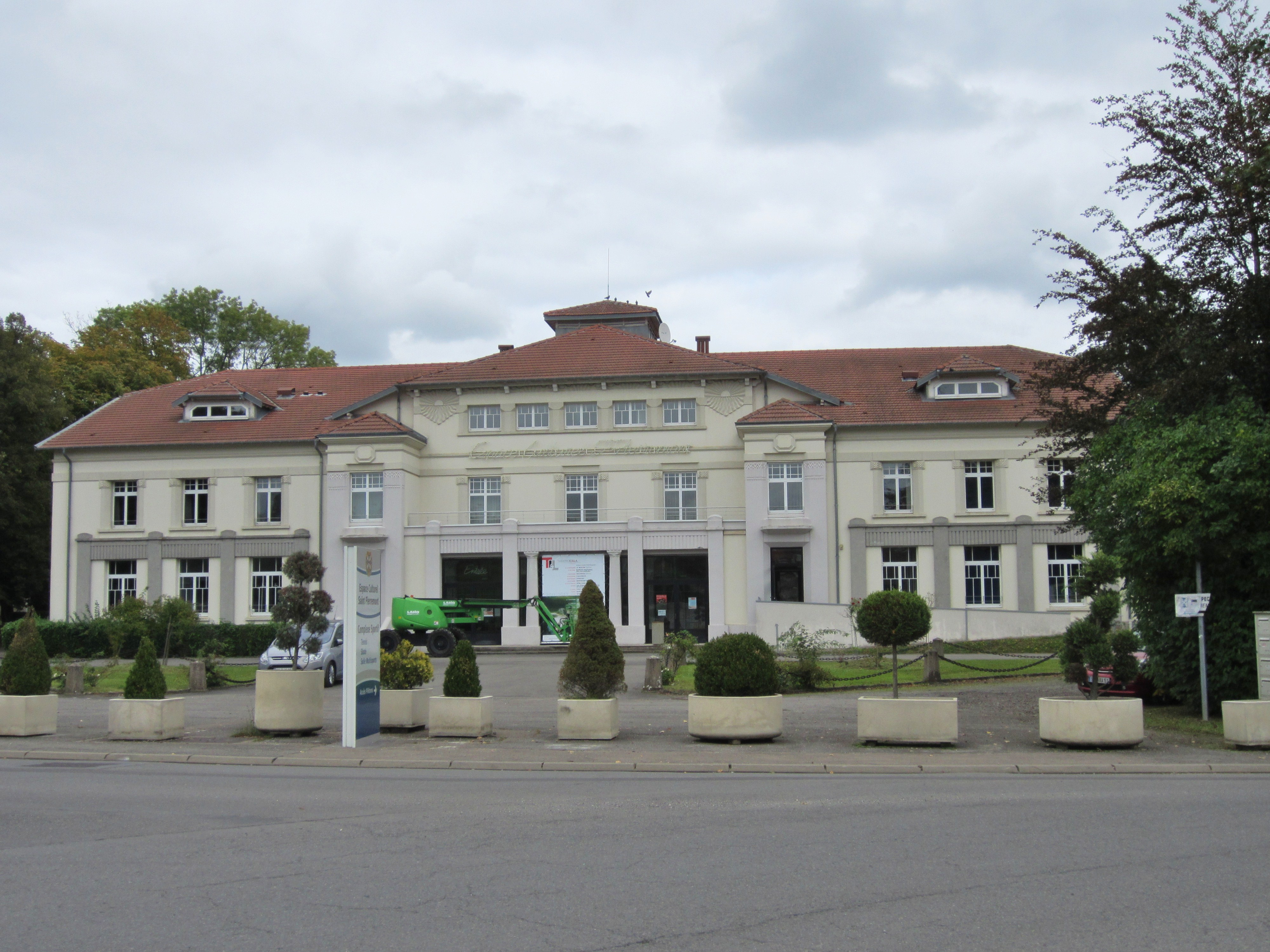 Description Espace Saint Pierremont – Théâtre Ici&Là (Salle des Fêtes), Mancieulles, Val de Briey Espace Saint Pierremont – Théâtre Ici&Là (Salle des Fêtes), Mancieulles, Val de Briey